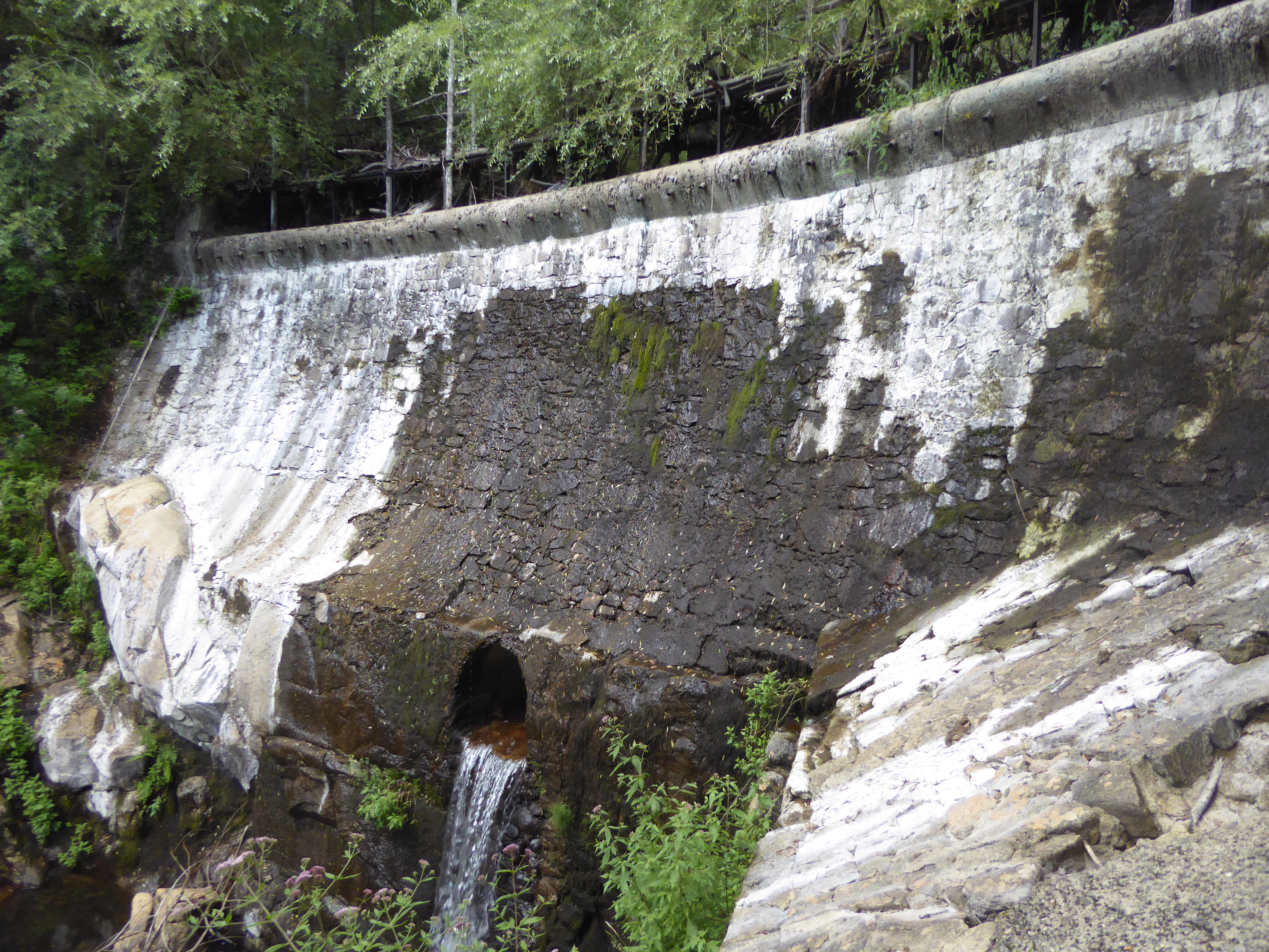 Diga Azzarera dall'alto (Ferdinandea 2016)